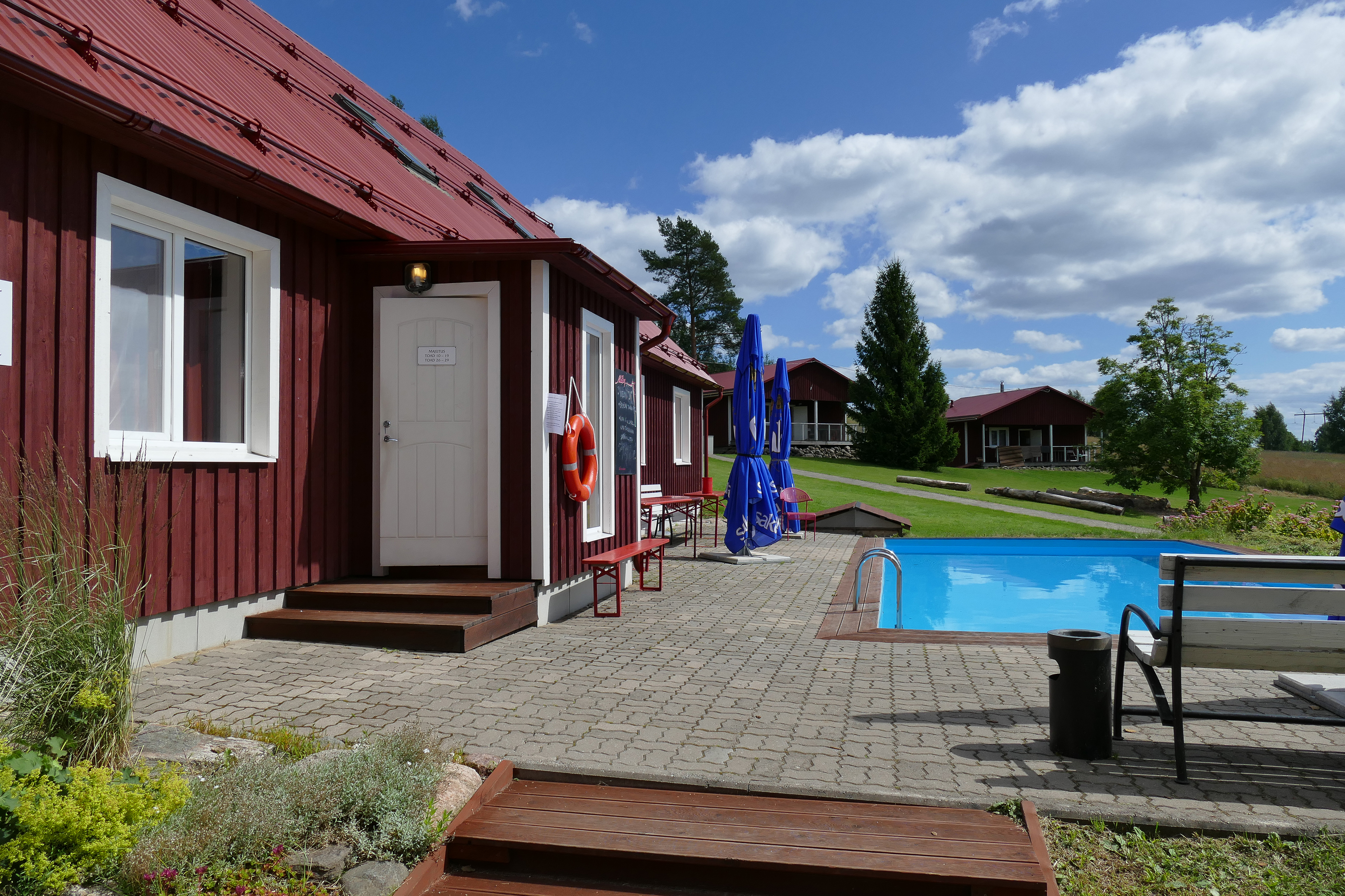 Voore külalistemaja, vaade puhkemajadele